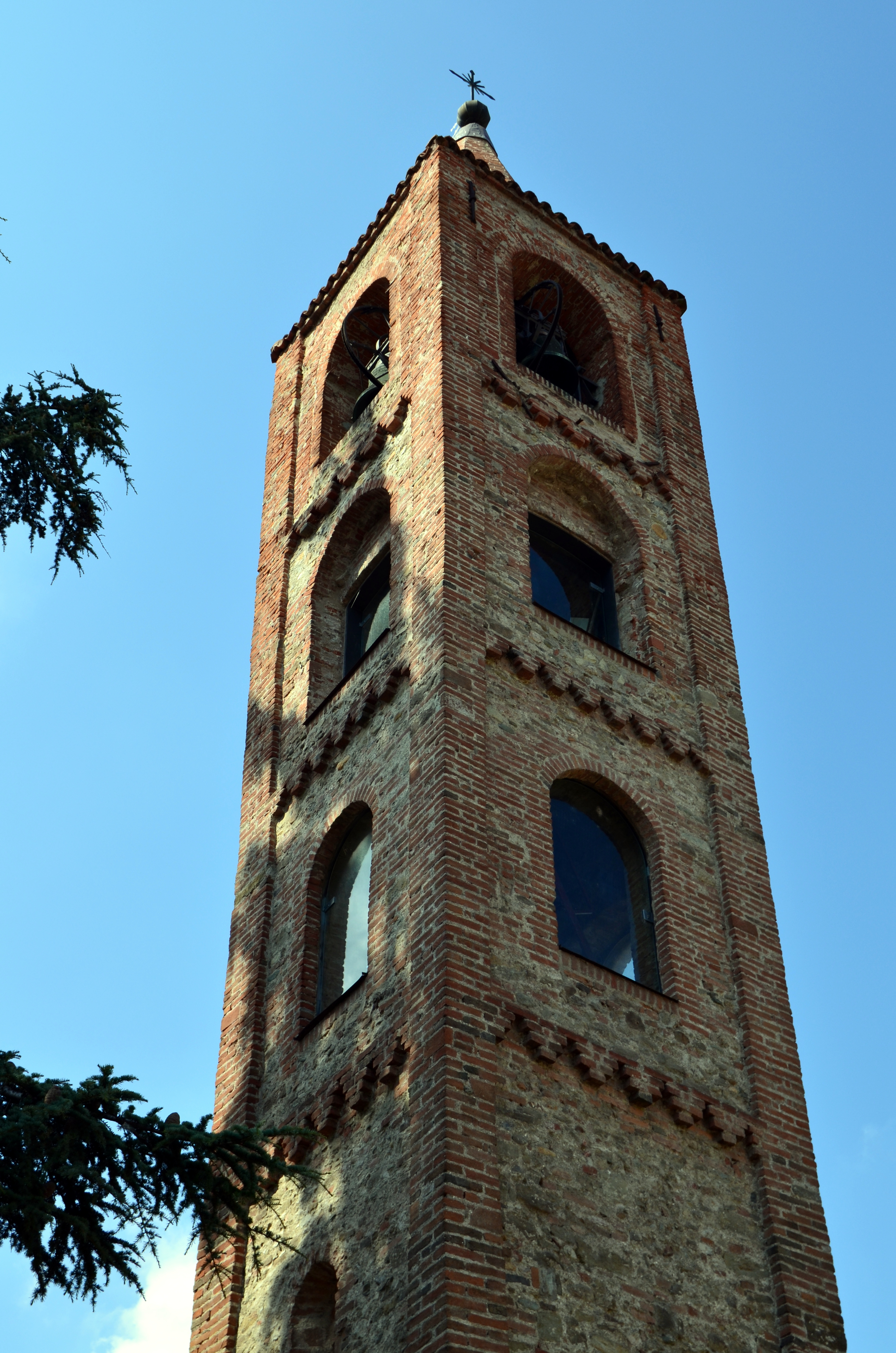 Chiesa di Santa Maria Extra muros, Millesimo, Liguria, Italia